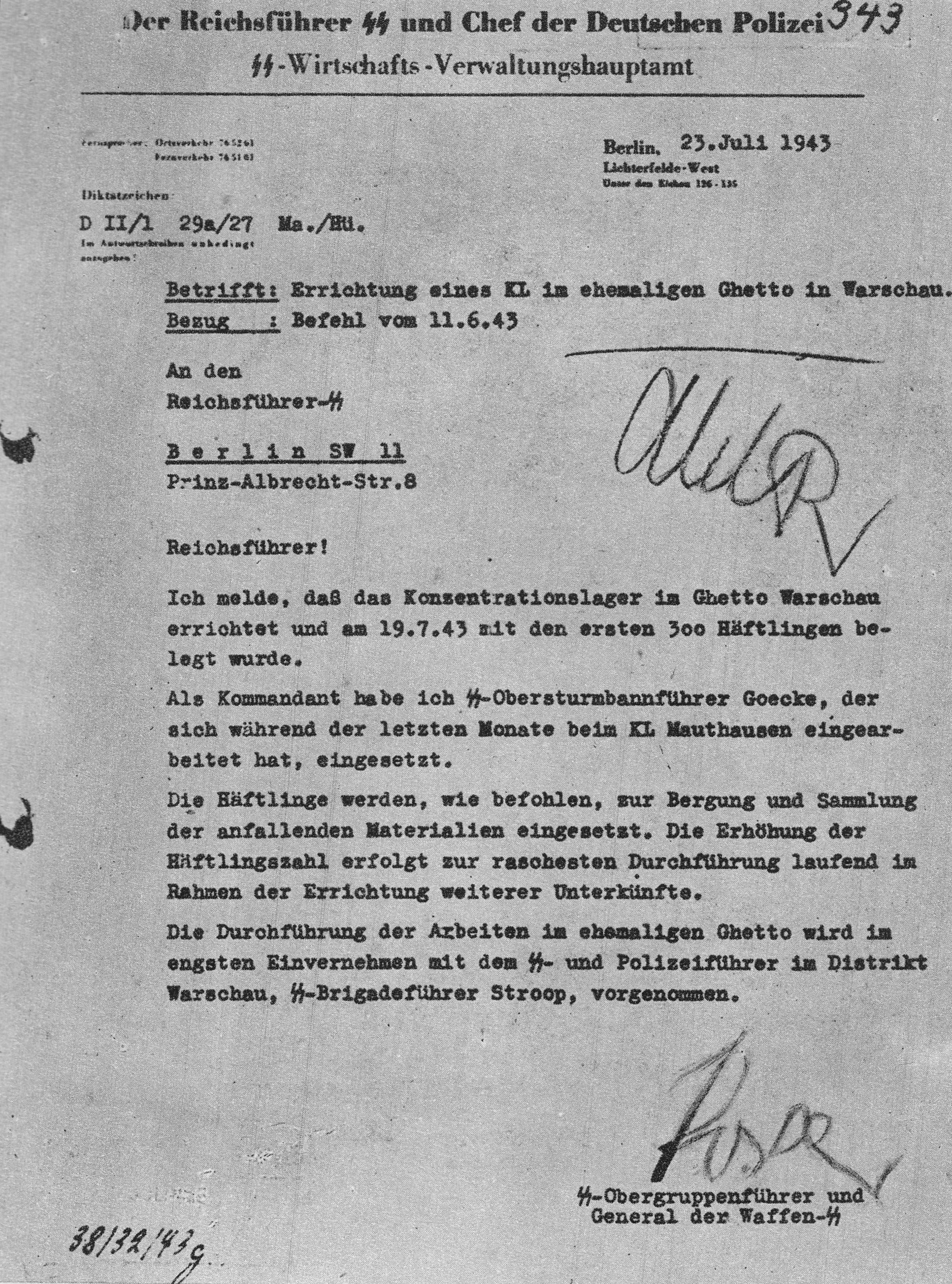 Pismo szefa Głównego Urzędu Gospodarczo-Administracyjnego SS Oswalda Pohla do Heinricha Himmlera z 23 lipca 1943 w sprawie utworzenia na terenie dawnego getta w Warszawie obozu koncentracyjnego (KL Warschau)